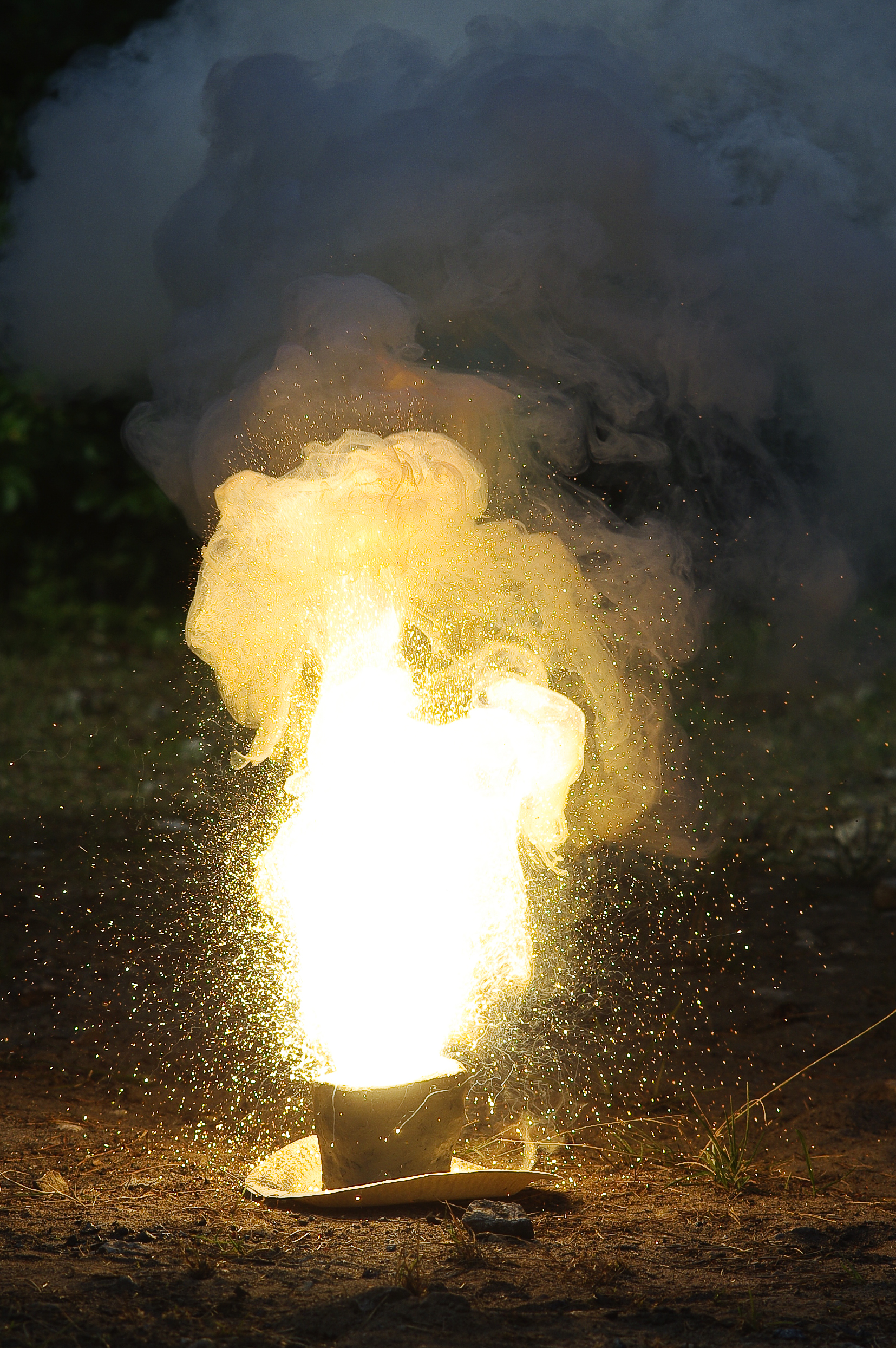 Alumiiniumi ja raud(III)oksiidi segu (termiit) eksotermiline reaktsioon